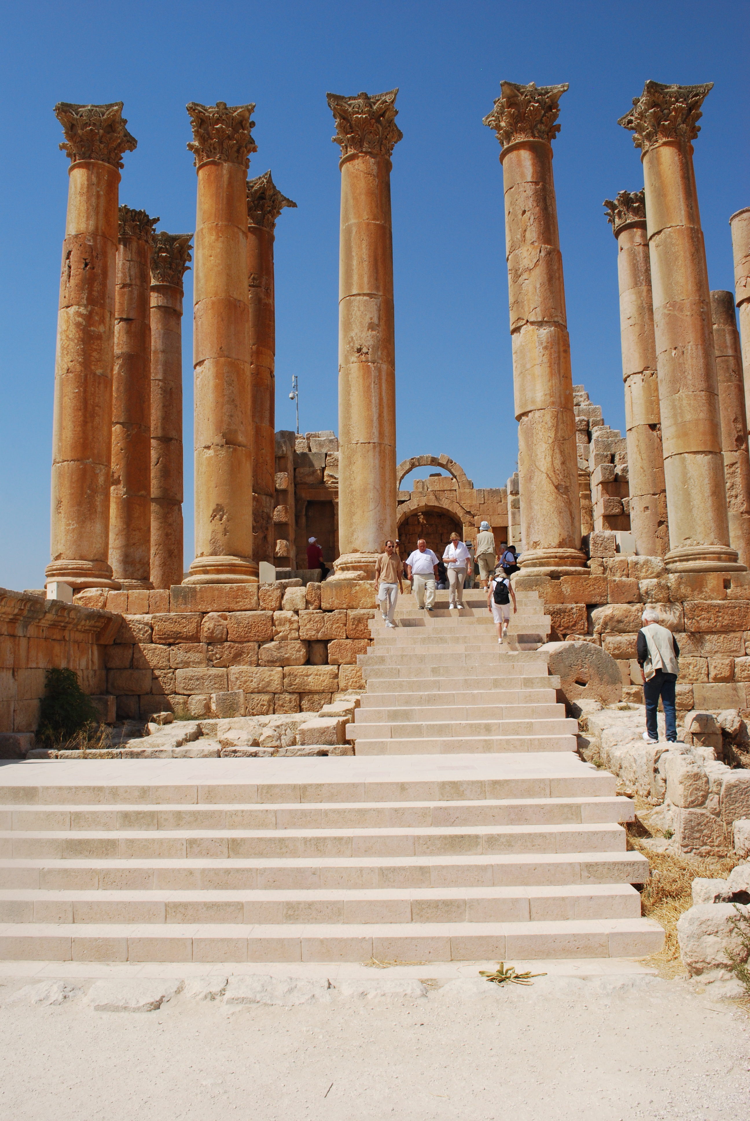 Le temple d'Artemis à Jerash.